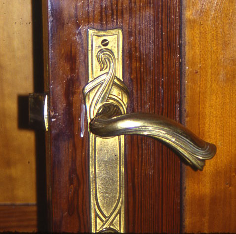 Tirador casa Horta (Bruselas). Autor: Rafaelji Tomada: agosto de 1987 Soporte: diapositiva EKTACHROME 35 mm. Cámara: Pentax AF 70